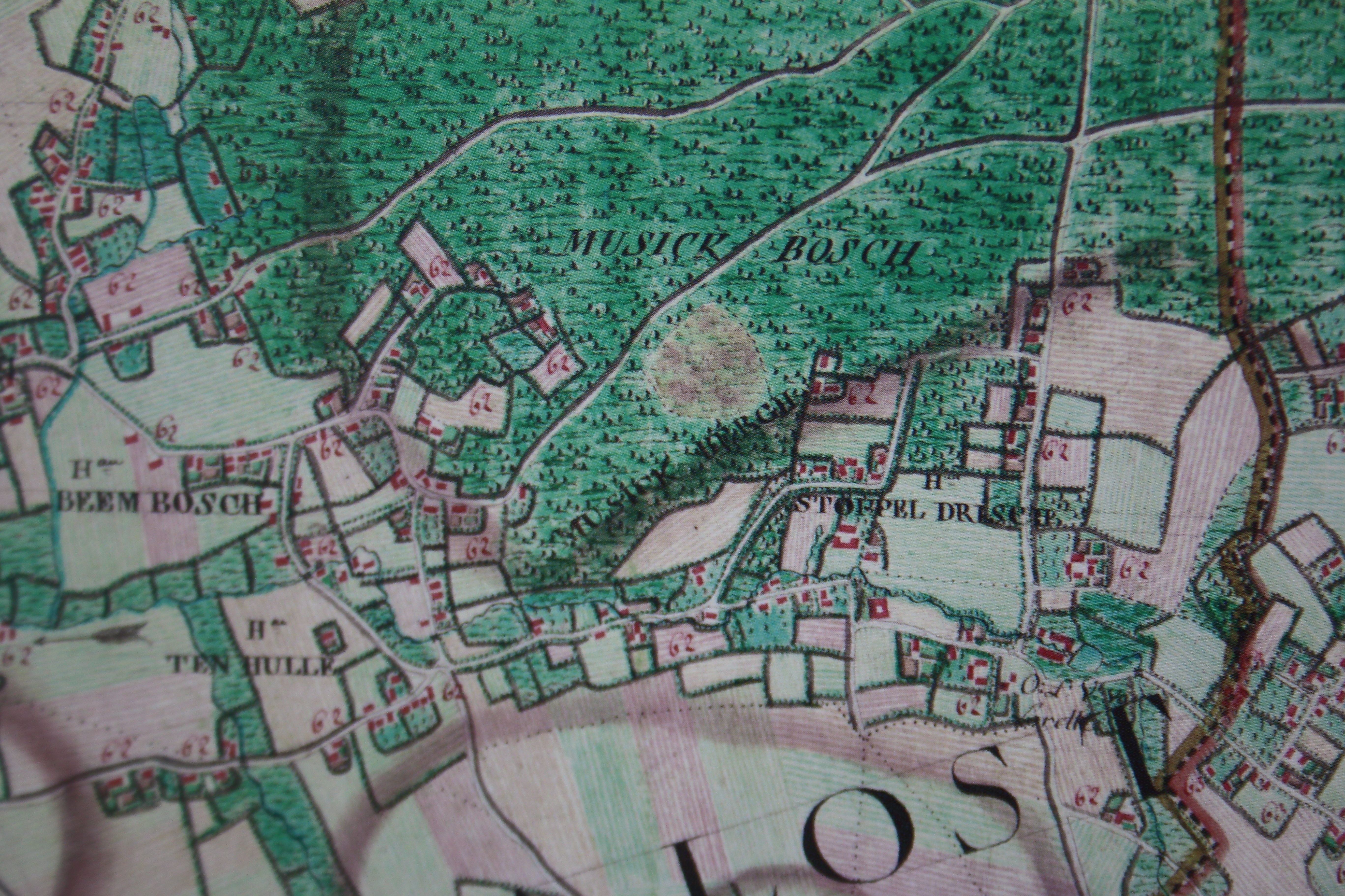 Muziekbos, Kapel Lorette, Ferraris